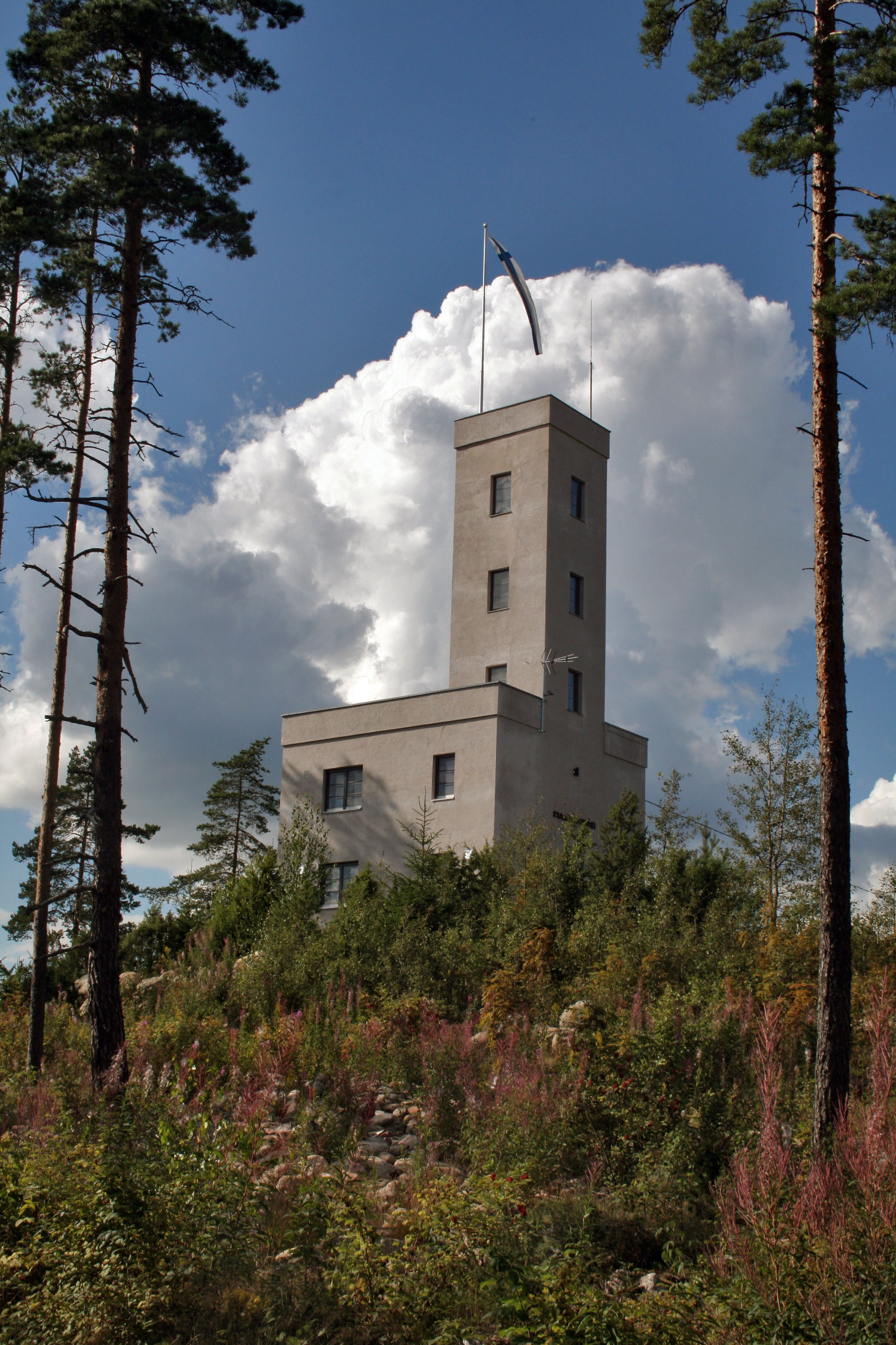 Mannanmäen näkötorni